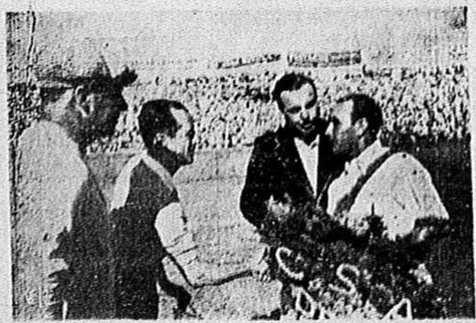 Perú campeón ante Uruguay en el Campeonato Sudamericano 1939